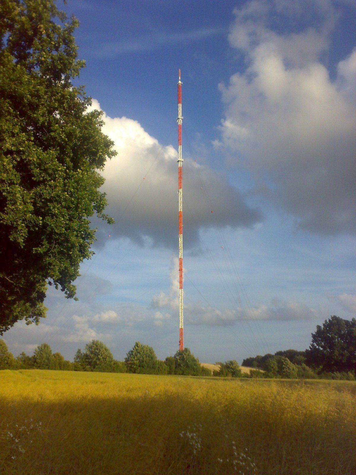 Sender Flensburg